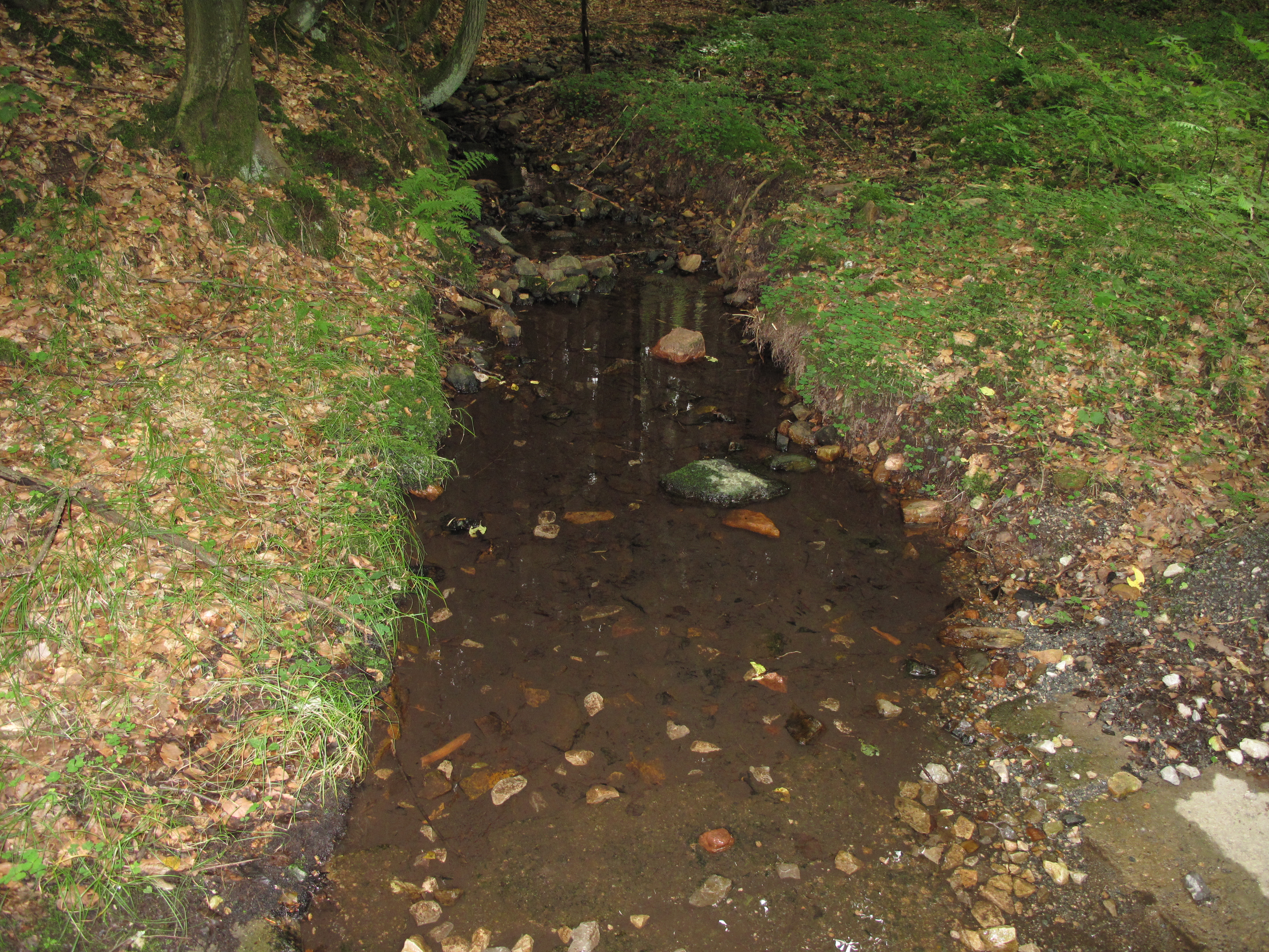 Potok Klučná u Karlovy Vsi. Česká republika.